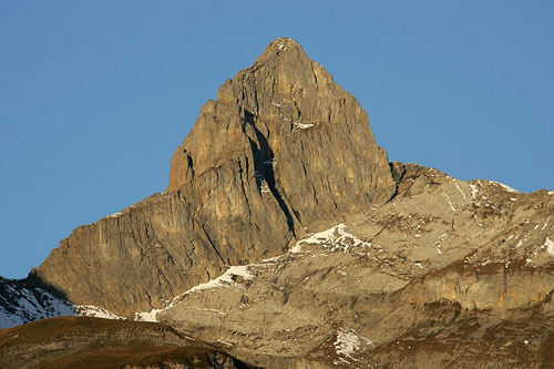 Höchturm, von Braunwald aus gesehen